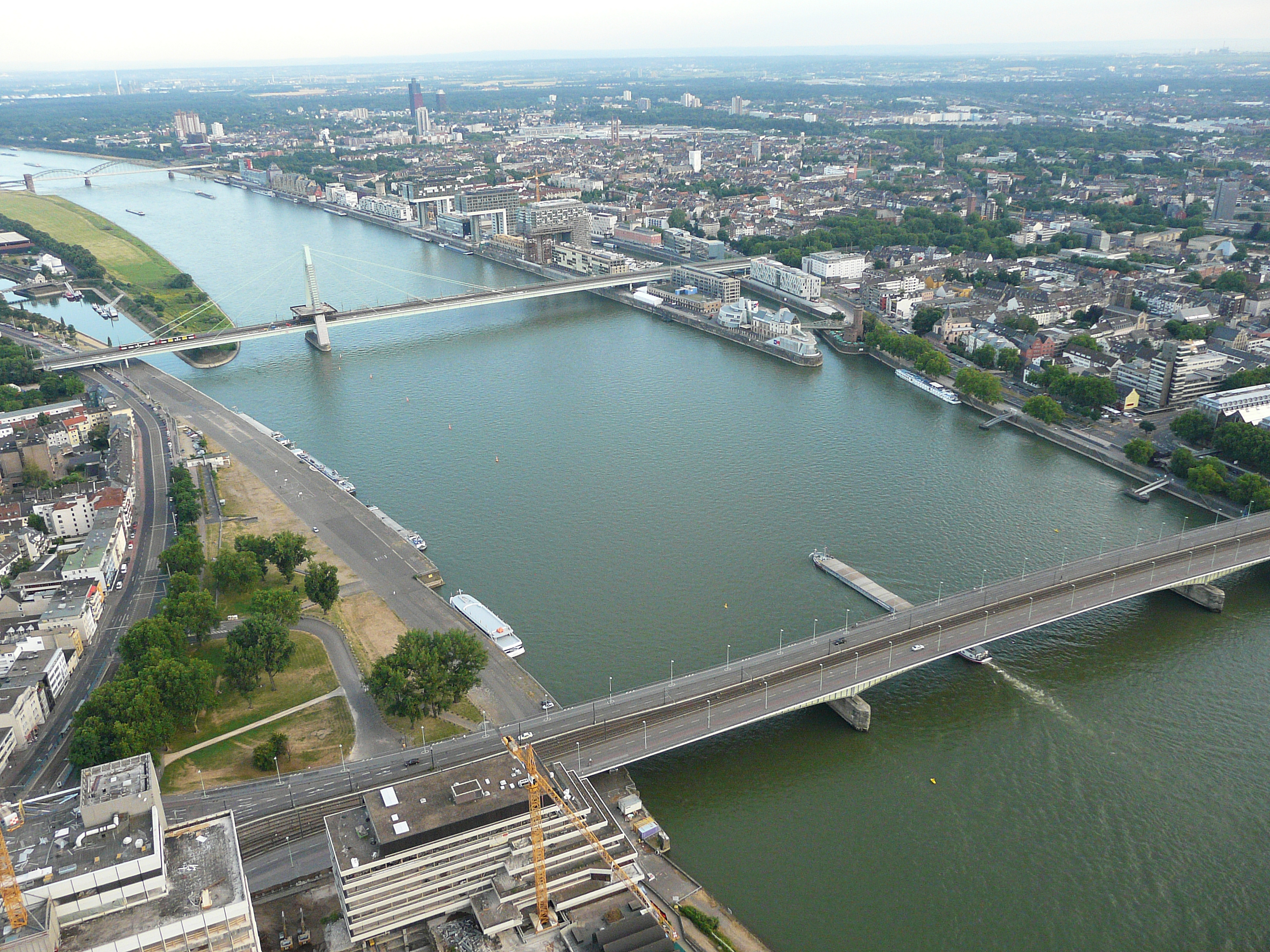 Deutzer Brücke vorn, Severinsbrücke hinten und rechts der Rheinauhafen.